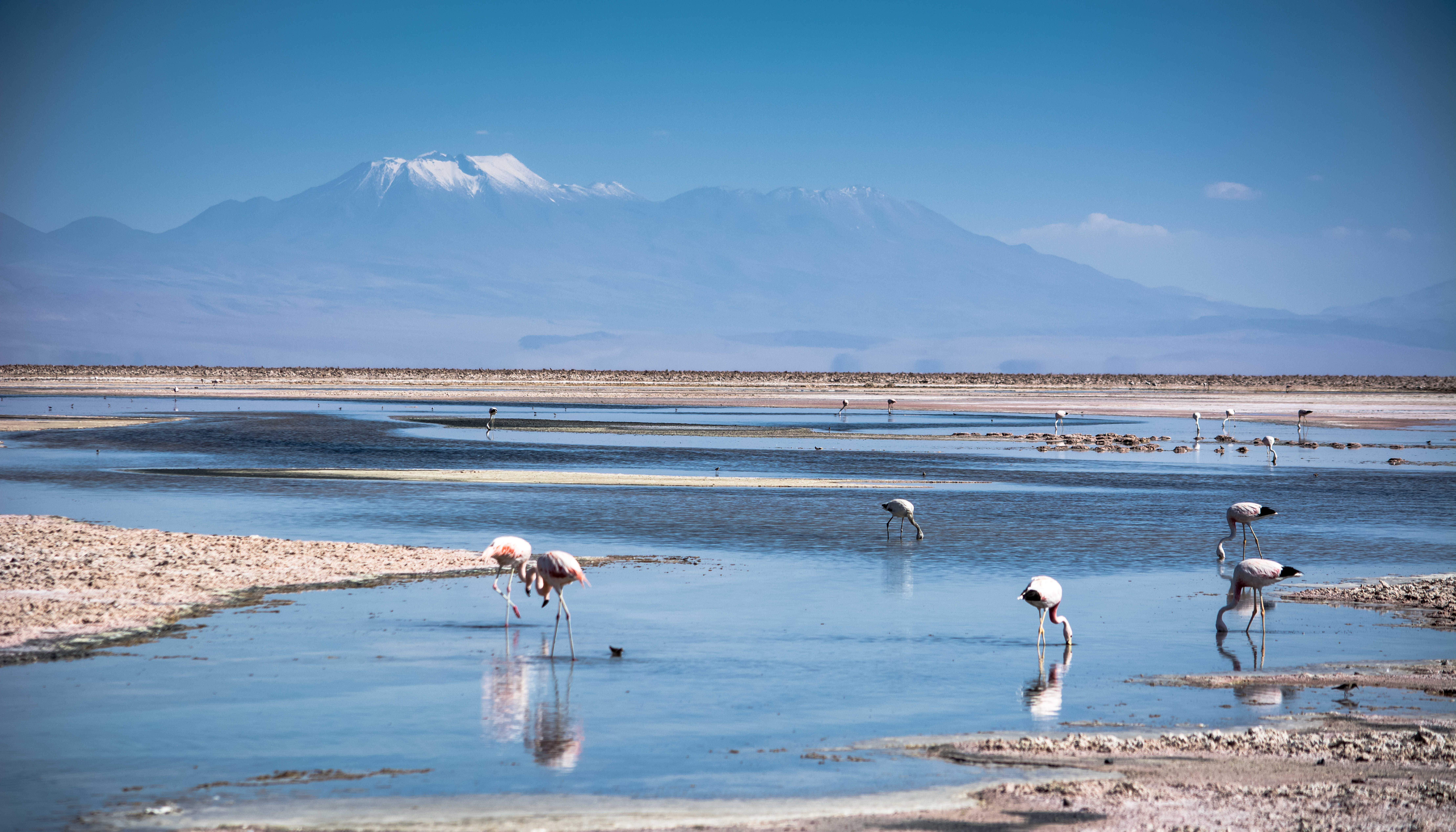 Reserva nacional Los Flamencos